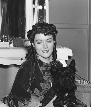 Актрисы Barbara O'Neil и Luise Rainer в гримерке с собакой мисс O'Neil и обезьянкой по кличке Professor Pepi, участниками фильма The Toy Wife или Frou Frou, 1938